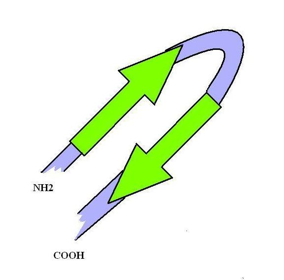 Cadena antiparal·lela d'una làmina beta.